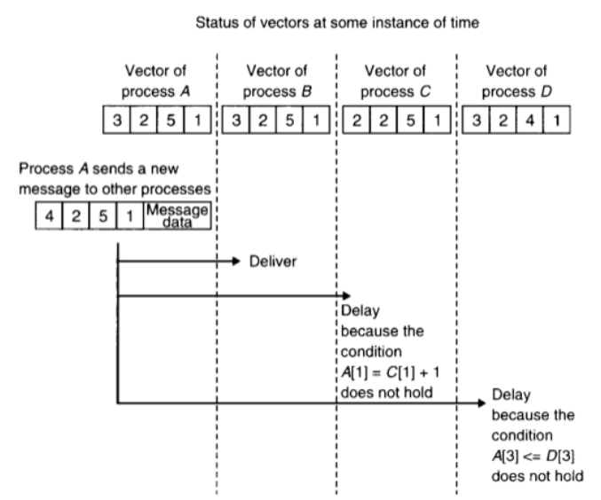 Distributed Systems, Concepts and Design